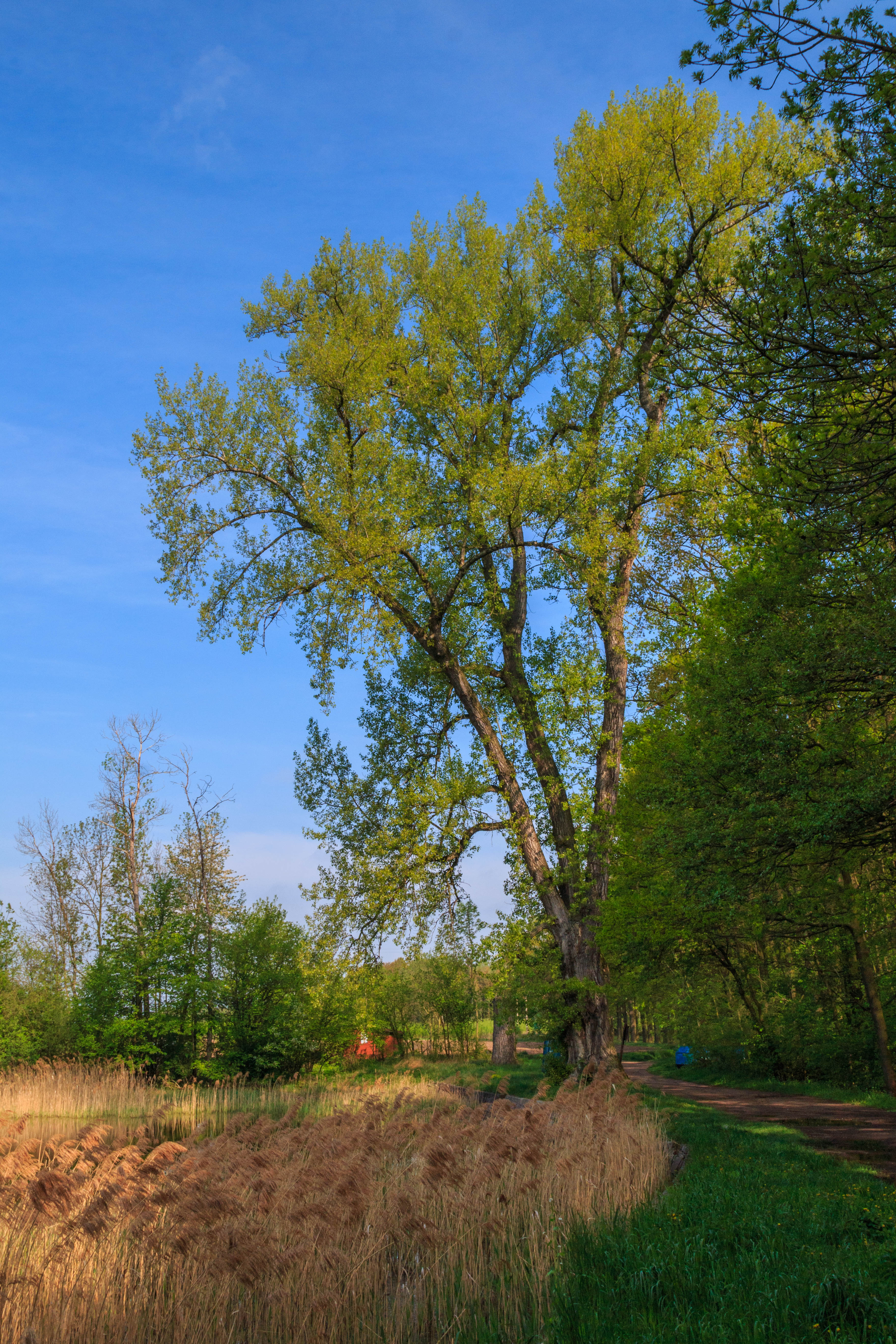 Březinský rybník u Klenovky Project: Vodstvo